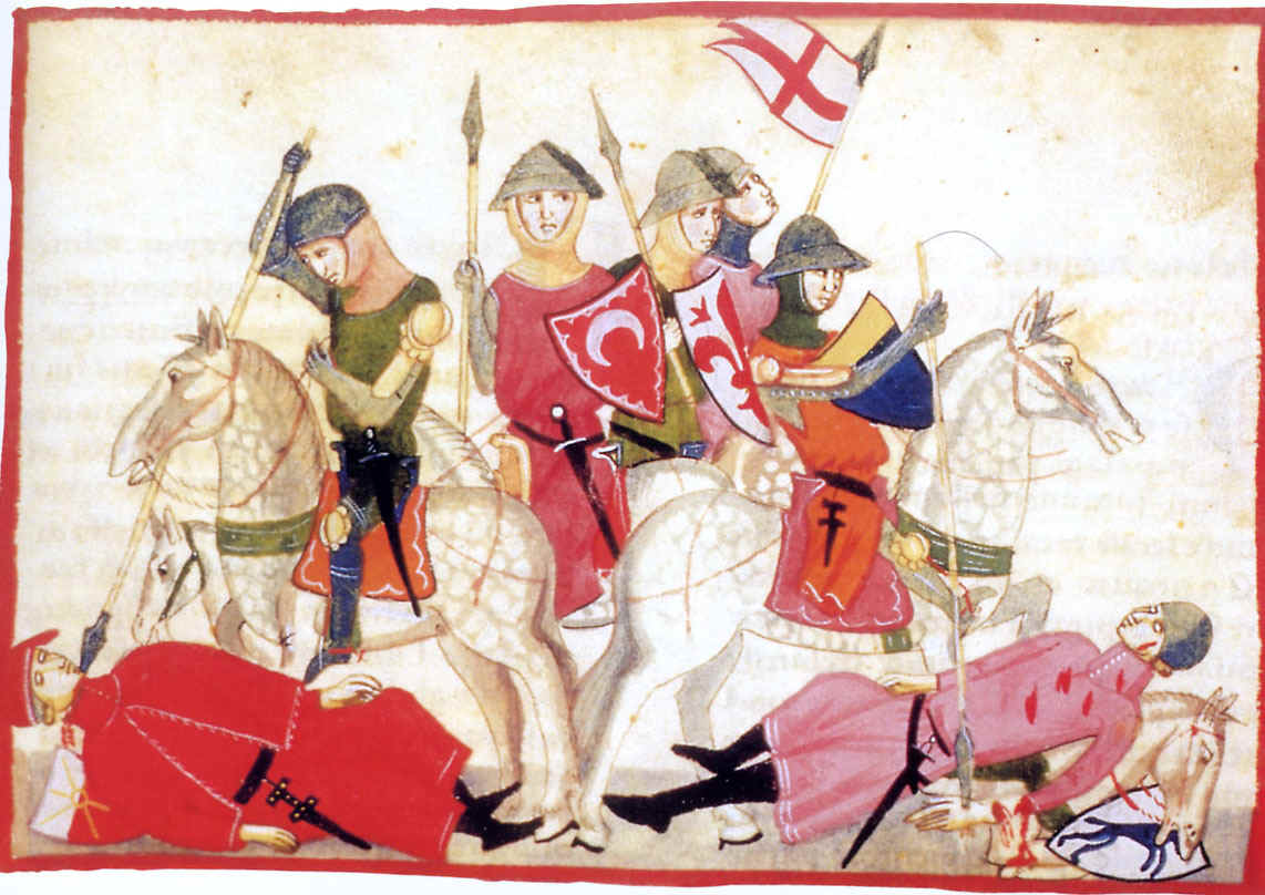 Come fu morto il nobile grande cittadino di Firenze messer Corso de’ Donati""